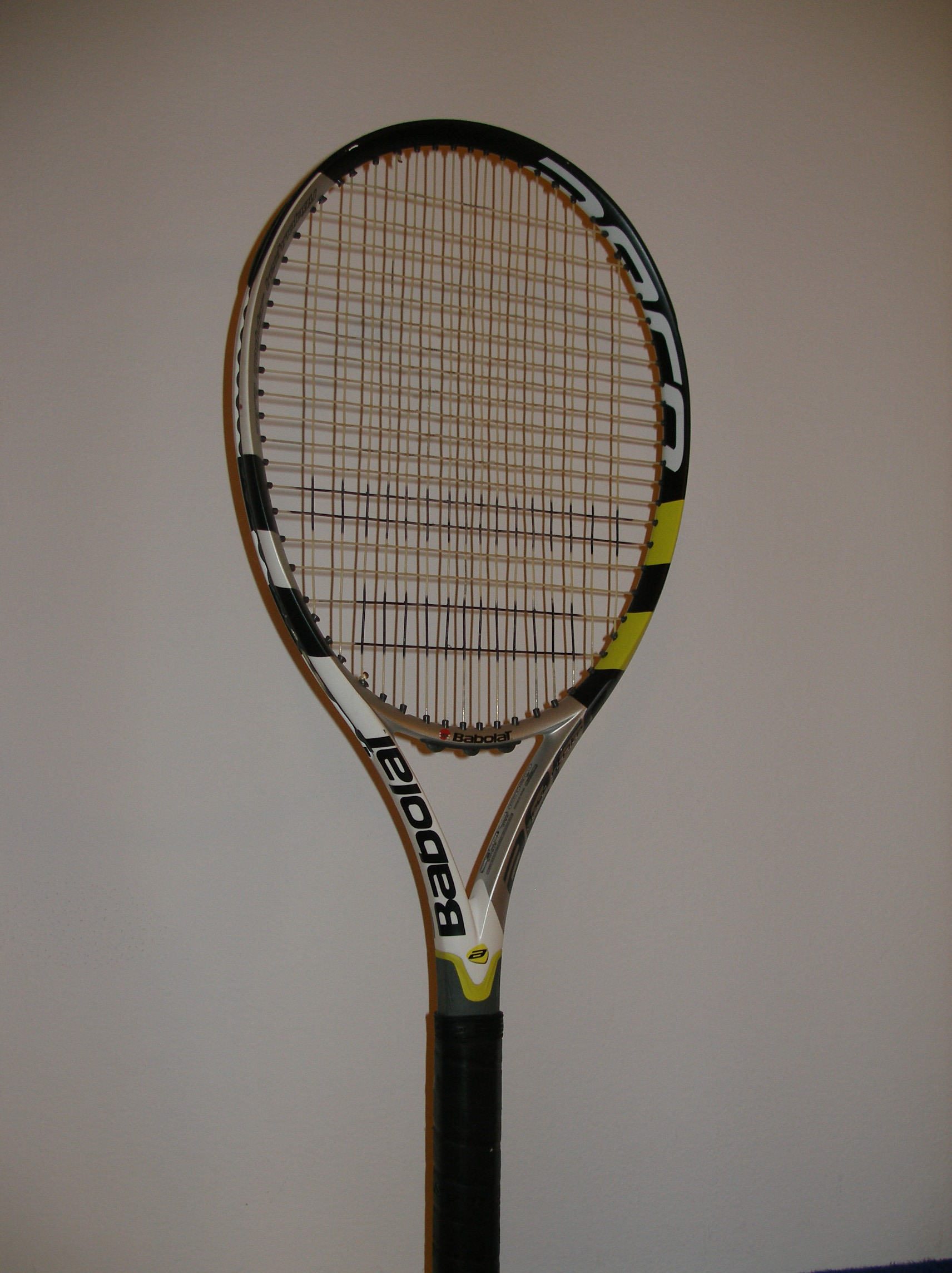 Rakieta Babolat Aero Strike Cortex